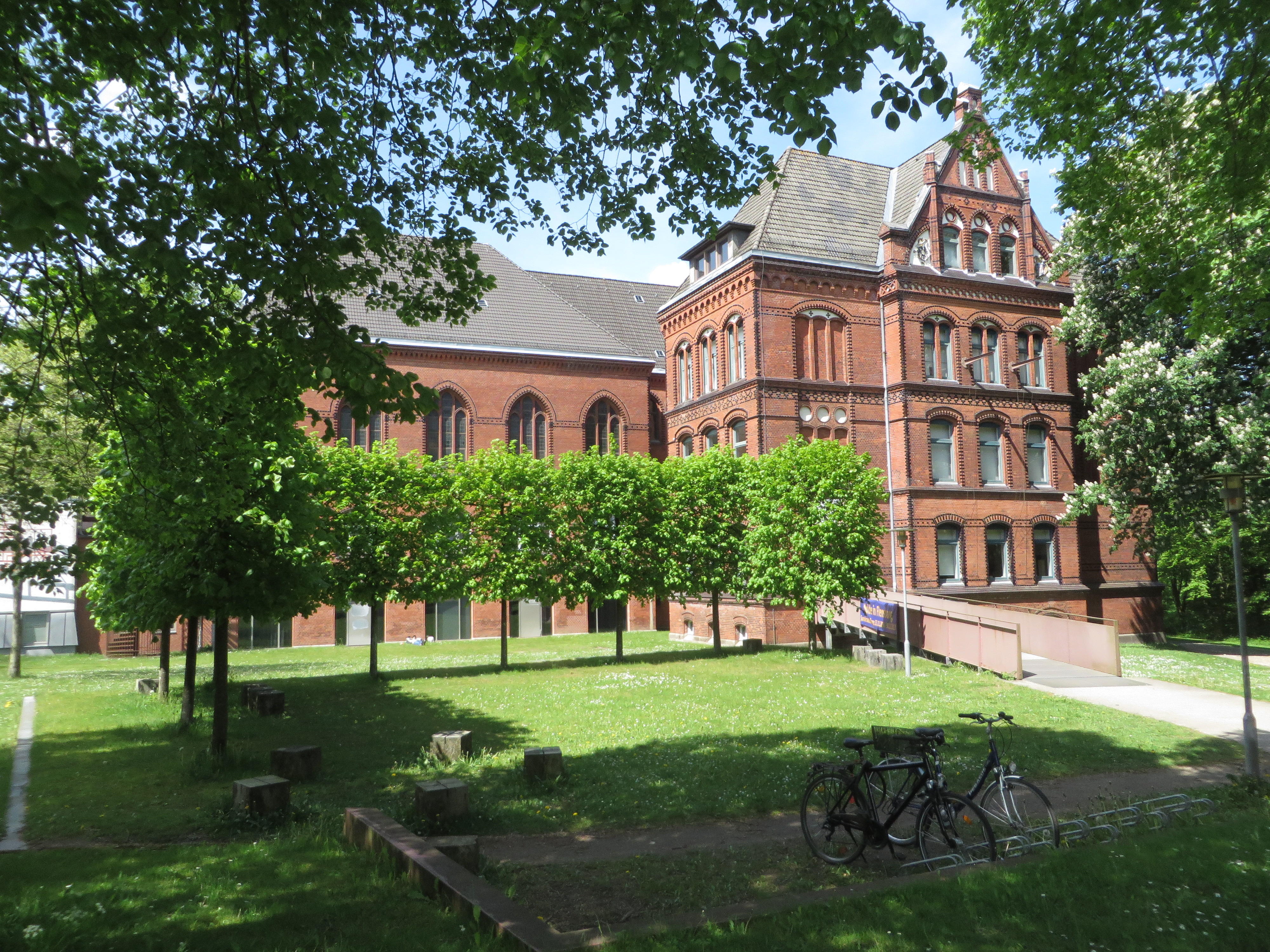 Hans-Christiansen-Haus (Flensburg Mai 2017), Bild 01